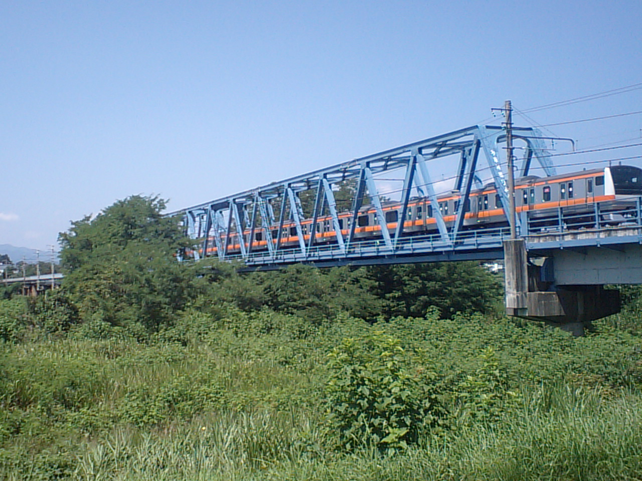 JR五日市線多摩川橋梁